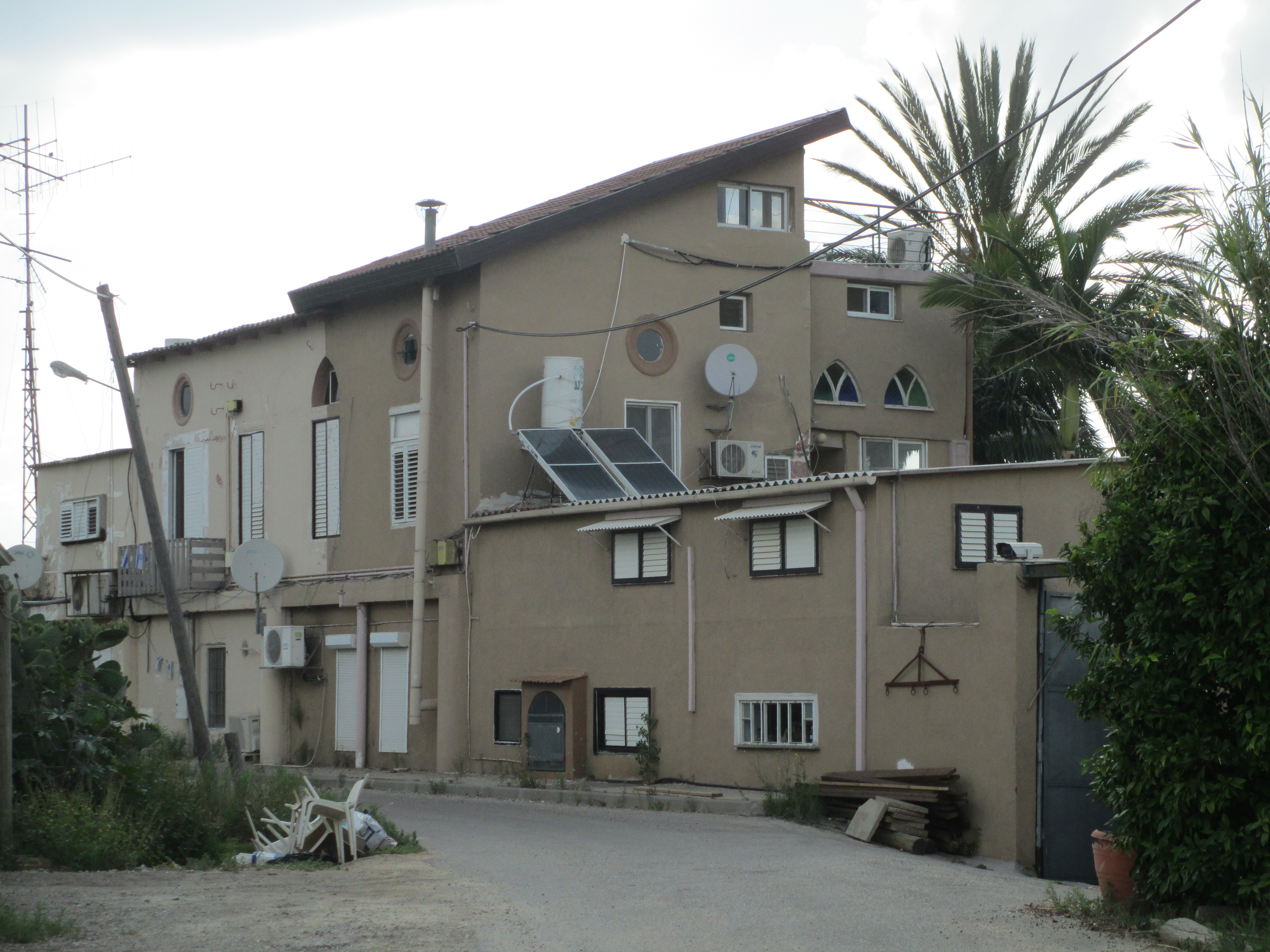 בית מהכפר אל חירייה ליד צומת מסובים, השתייך למשפחת העורך דין הערבי חדד